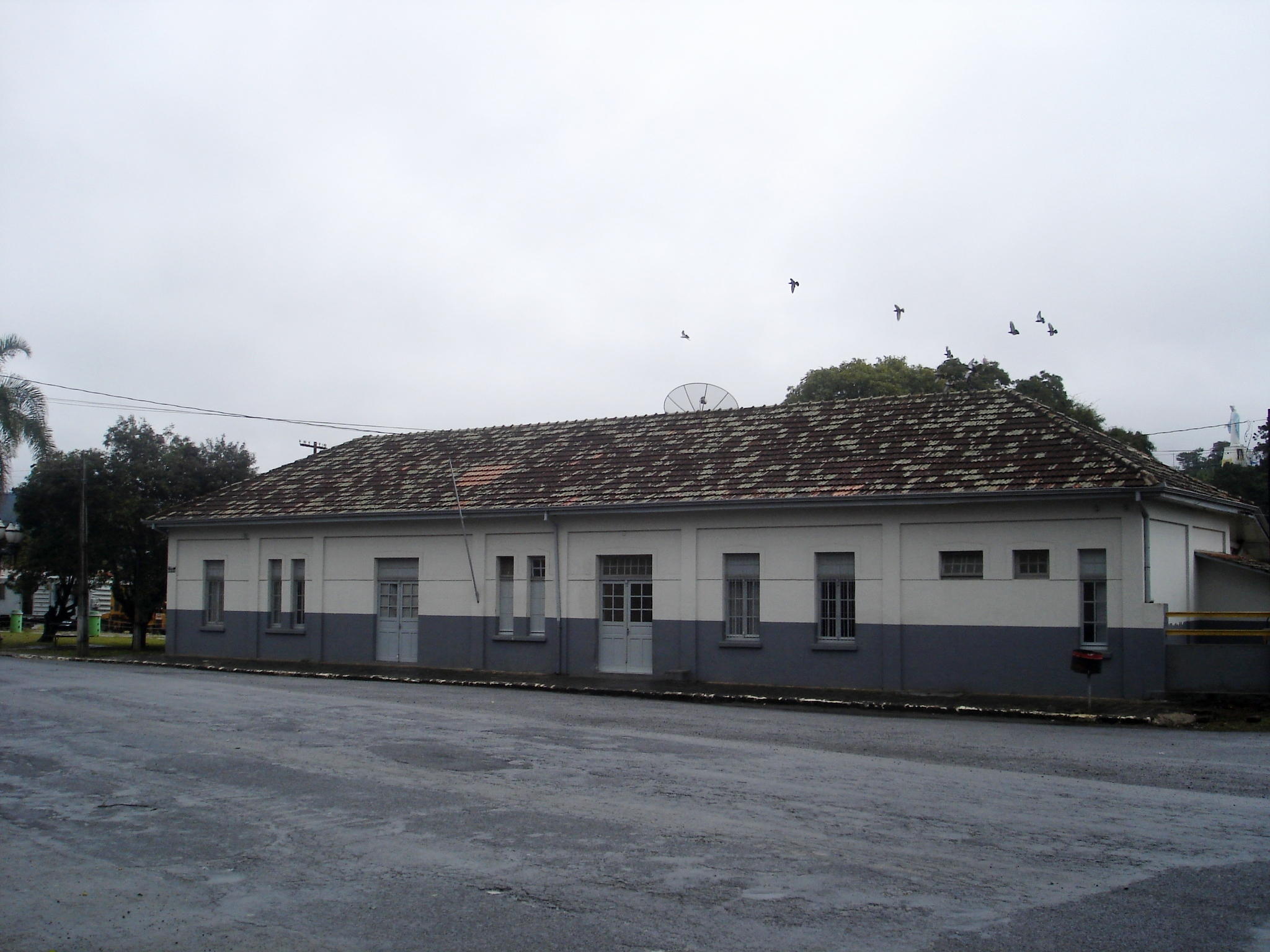 Est. Ferroviária de Irati 25.05.2009